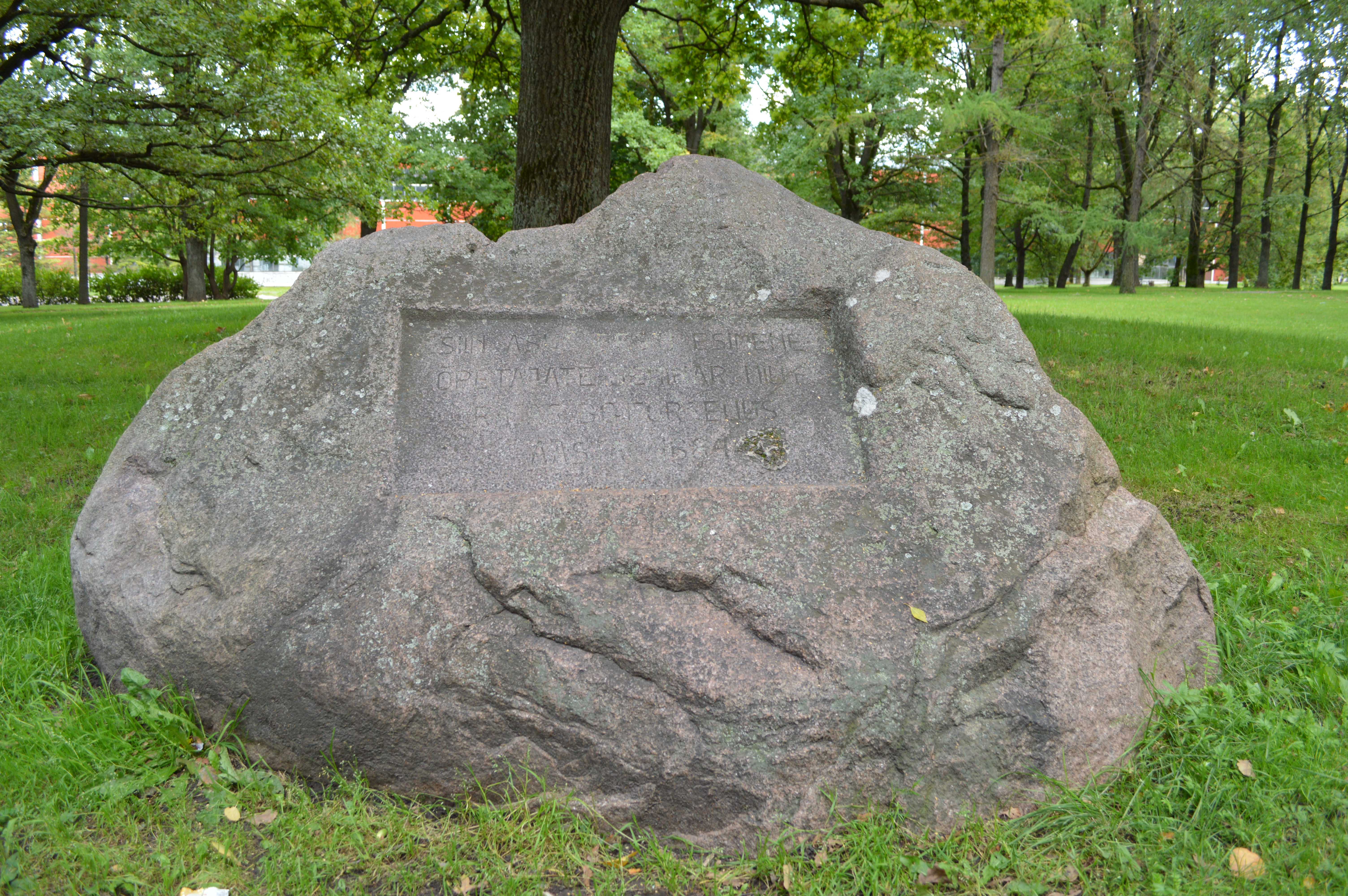 Forseliuse seminari mälestuskivi